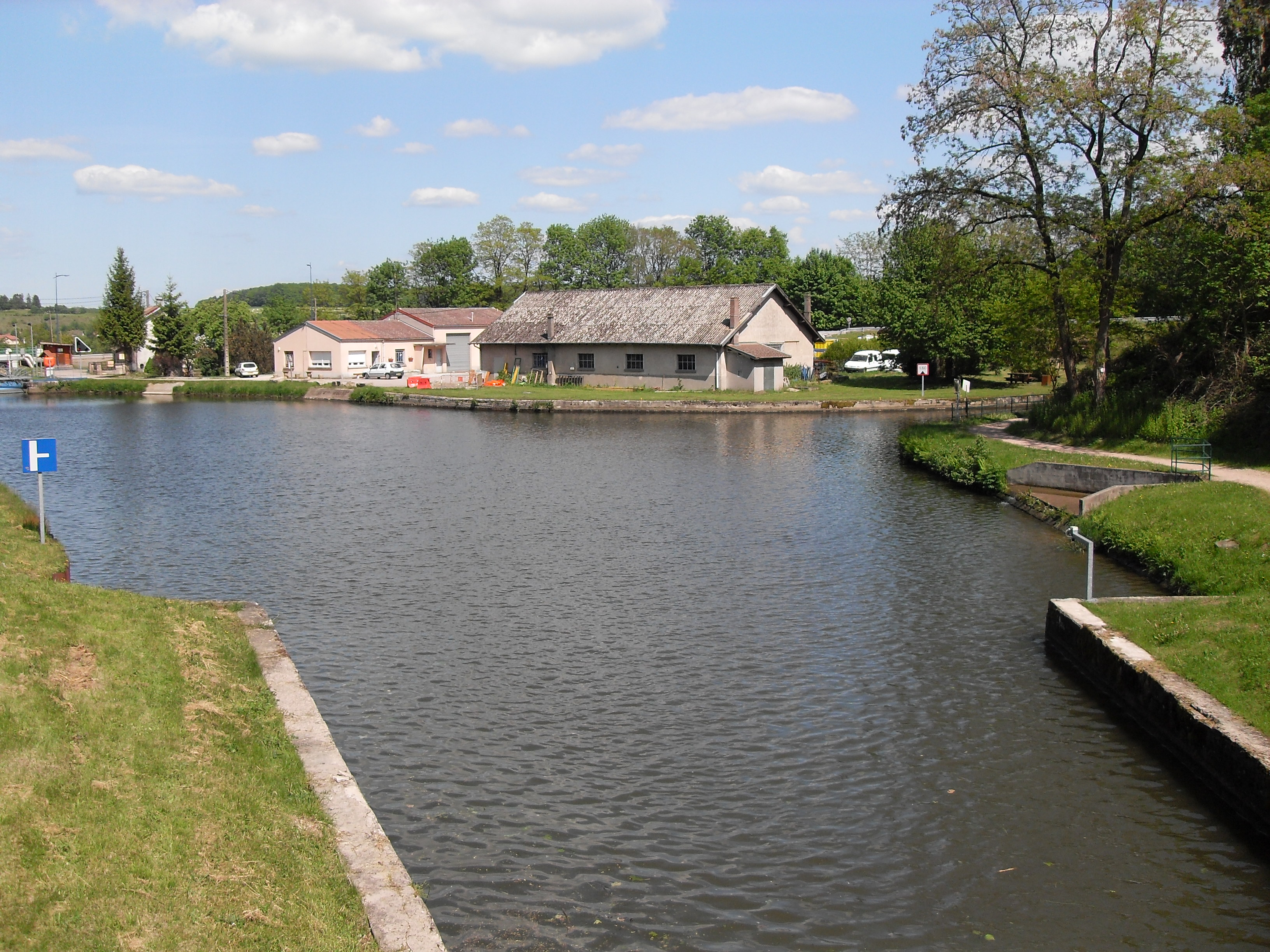 La bifurcation du Canal des Vosges pour l’embranchement d’Epinal à Golbey